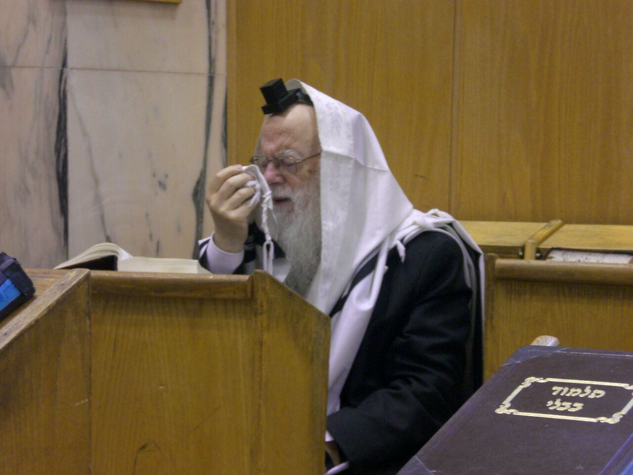 גבריאל טולדנו היה מייסד וראש ישיבת אור ברוך בירושלים וחבר מועצת חכמי התורה של ש"ס בשנות הקמתה הראשונות.